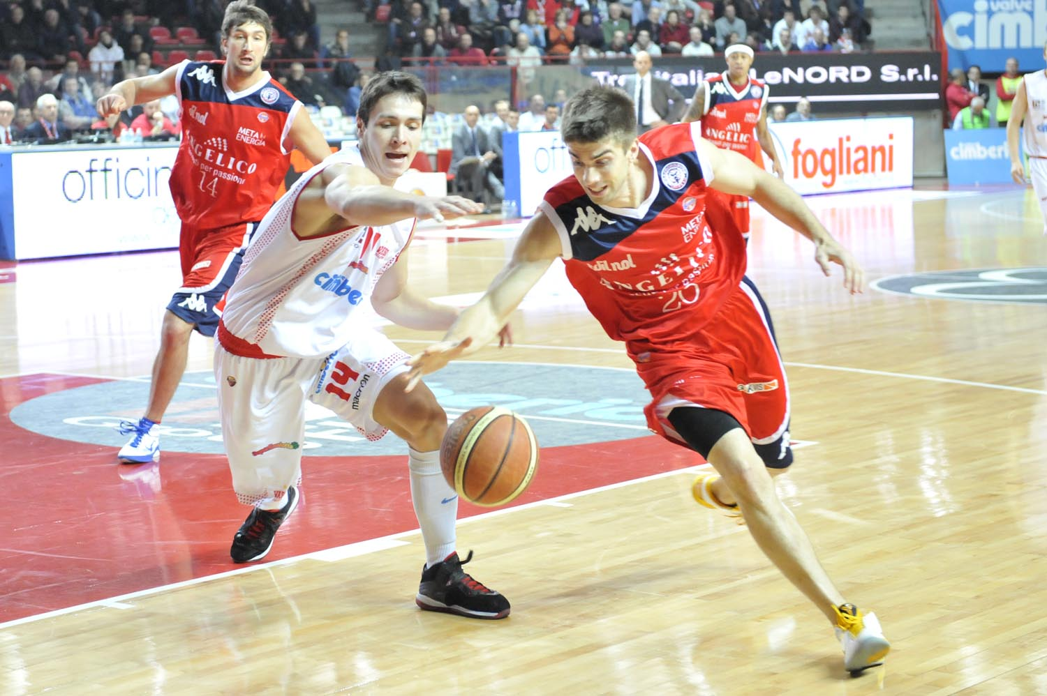 Kristjan Kangur (sinistra) e Jeff Viggiano (a destra)